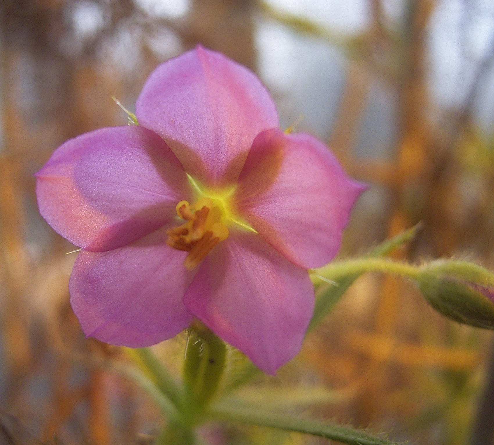 Flora Roridula dentata